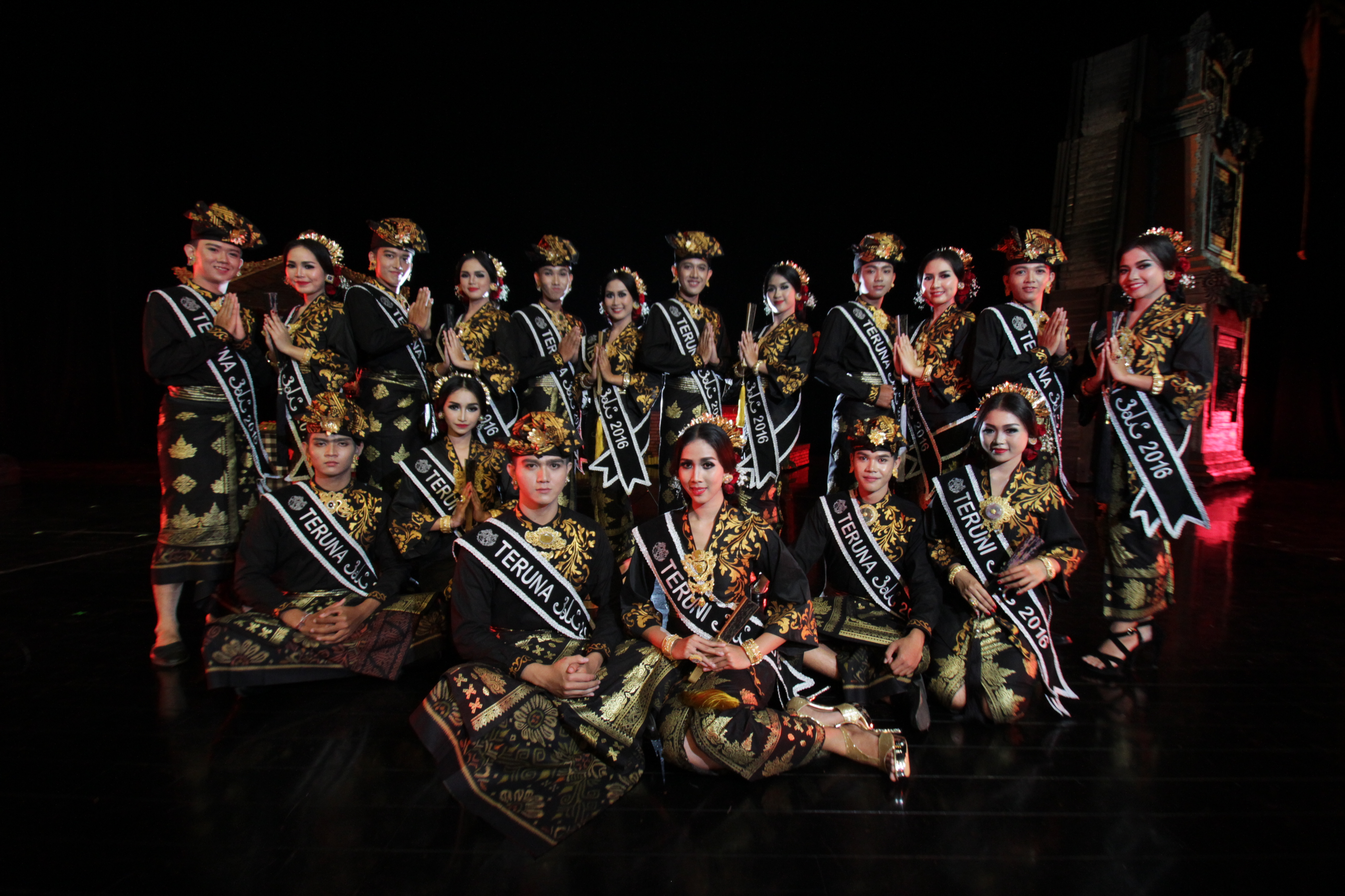 Teruna Teruni Bali adalah Duta Wisata Bali Resmi yang telah diakui oleh ADWINDO